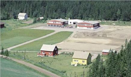 Bildets eier, Akershusmuseet v/ Atilla Moen-Duran, har gitt tillatelse til bruk på Wikipedia. Bildet er mer enn 50 år gammelt, kan ikke anses som kunstverk, og er således å betrakte som copyrightfritt. Bildet viser flyfoto av Haneborg skole i 1961.